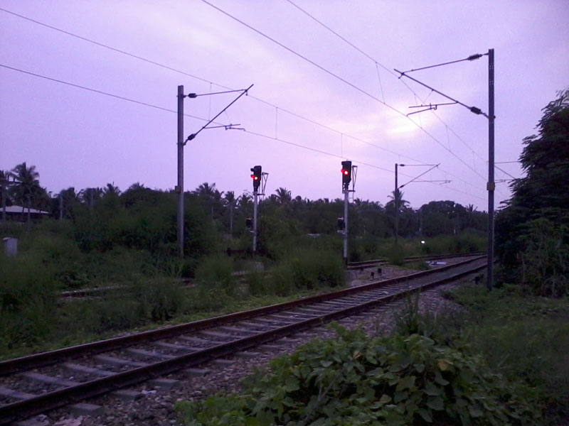 ആധുനിക സിഗ്നൽ സംവിധാനം, ഓരോ പാളത്തിനും പ്രത്യേകം.